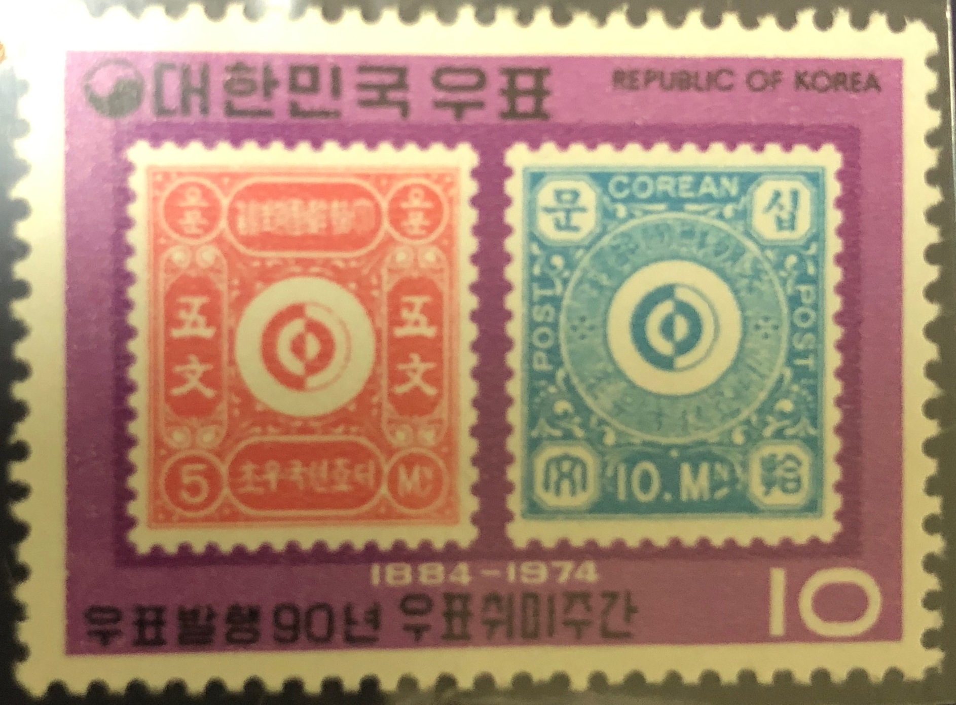 우취 90주년 기념